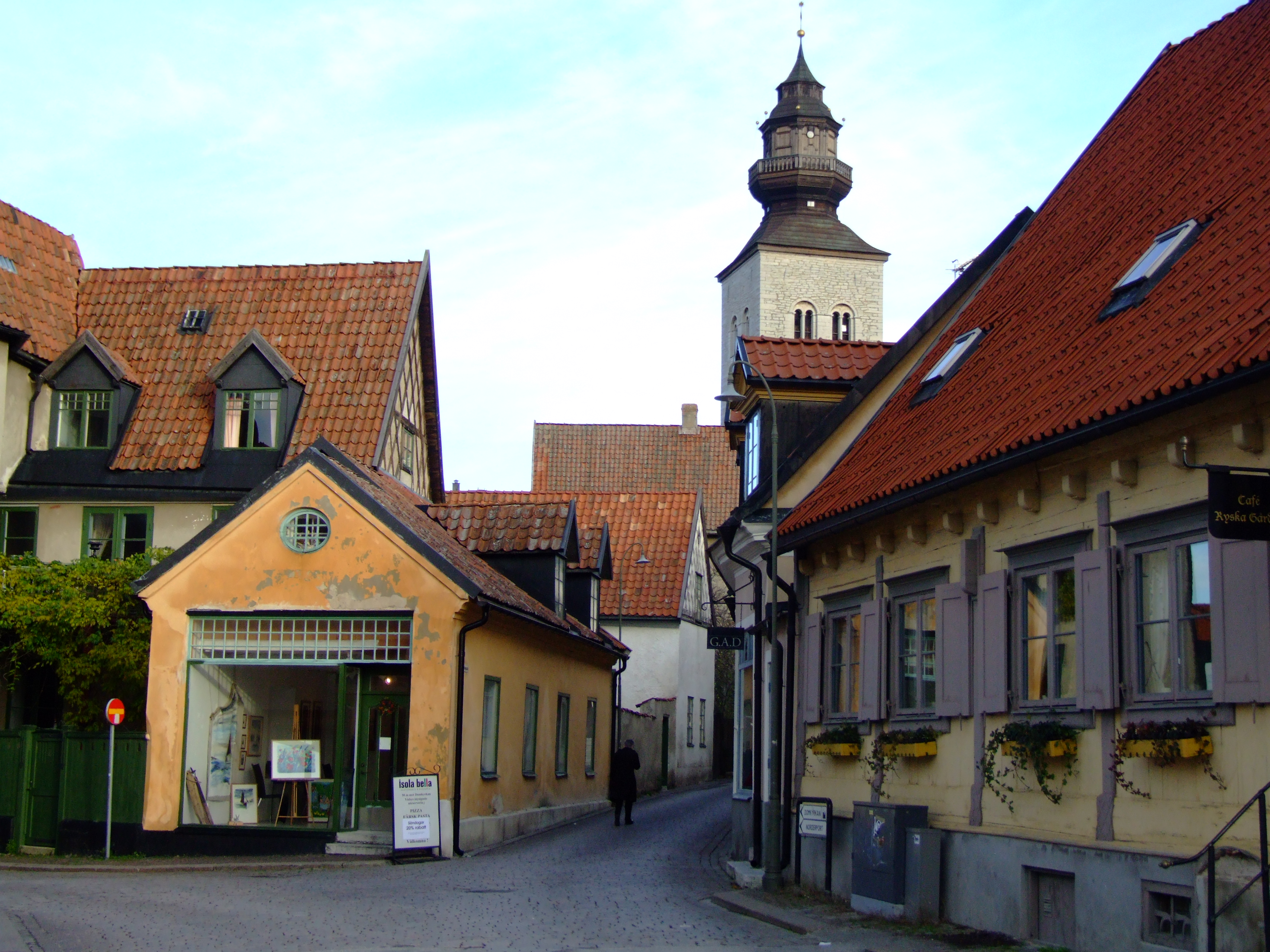 Stora Torget och Södra Kyrkogatan, Visby. Till vänster Södra Kyrkogatan 11 (kvarteret Nunnan 1). Till höger Ryska gården = Södra Kyrkogatan 14 (kvarteret Munken 12). Domkyrkan i bakgrunden.